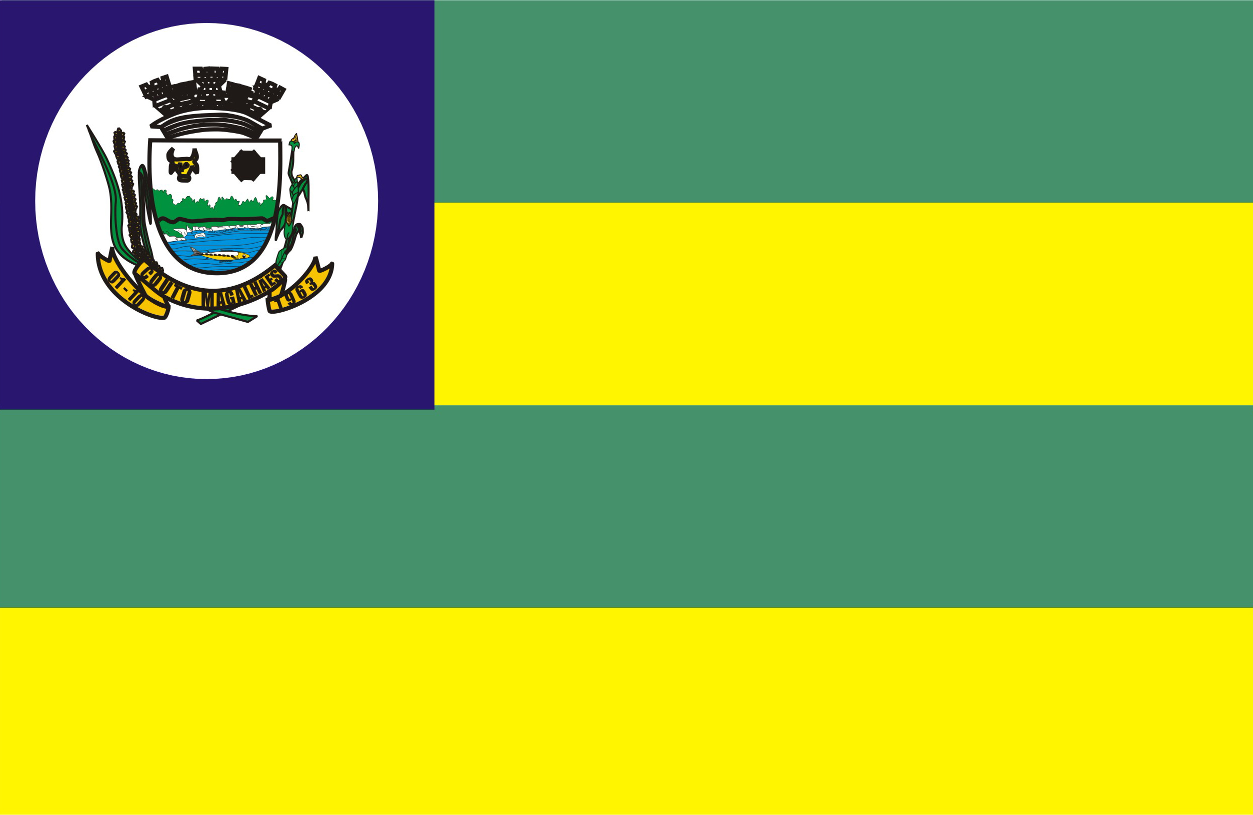 Bandeira do município de Couto de Magalhães, Tocantins, Brasil.